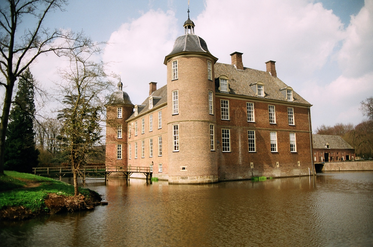 Kasteel gezien vanaf het voergangsbruggetje aan de weg